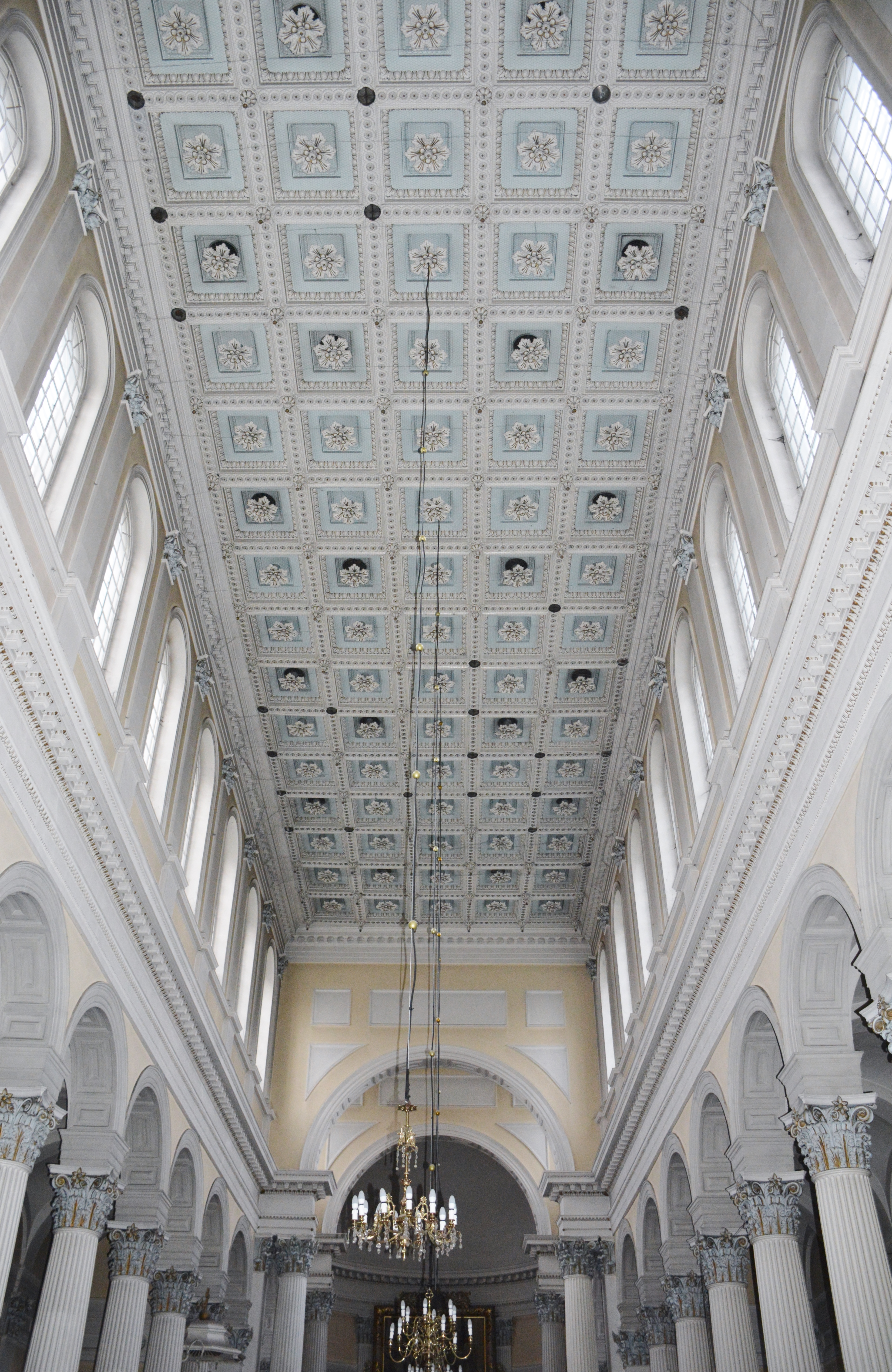 Mirów, Warsaw, Poland